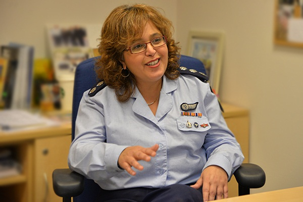 קצינת הרפואה החילית (קרפ"ח) אל"מ יפעת ארליך. בוגרת המכללה לביטחון לאומי.